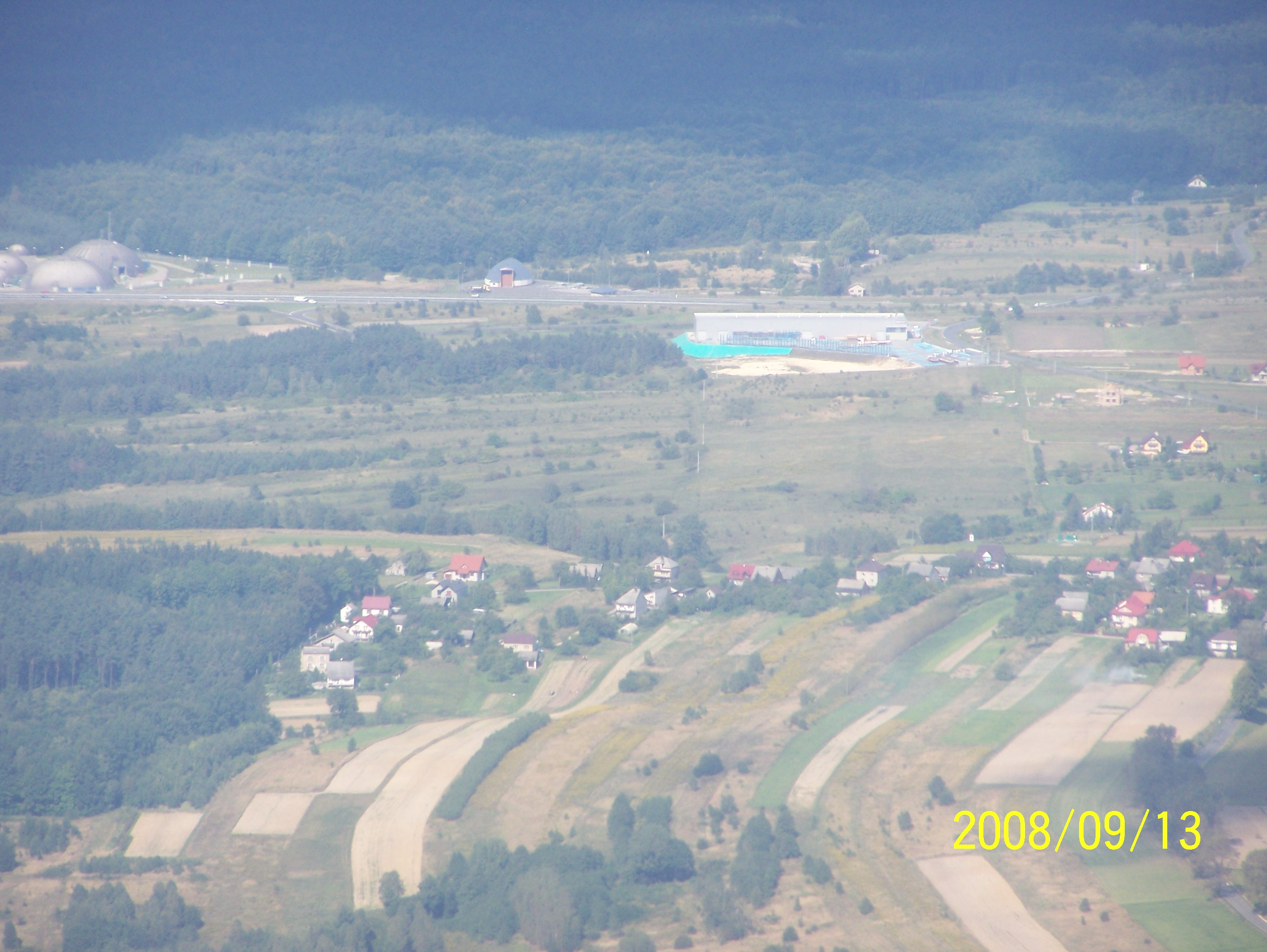 Alwernia